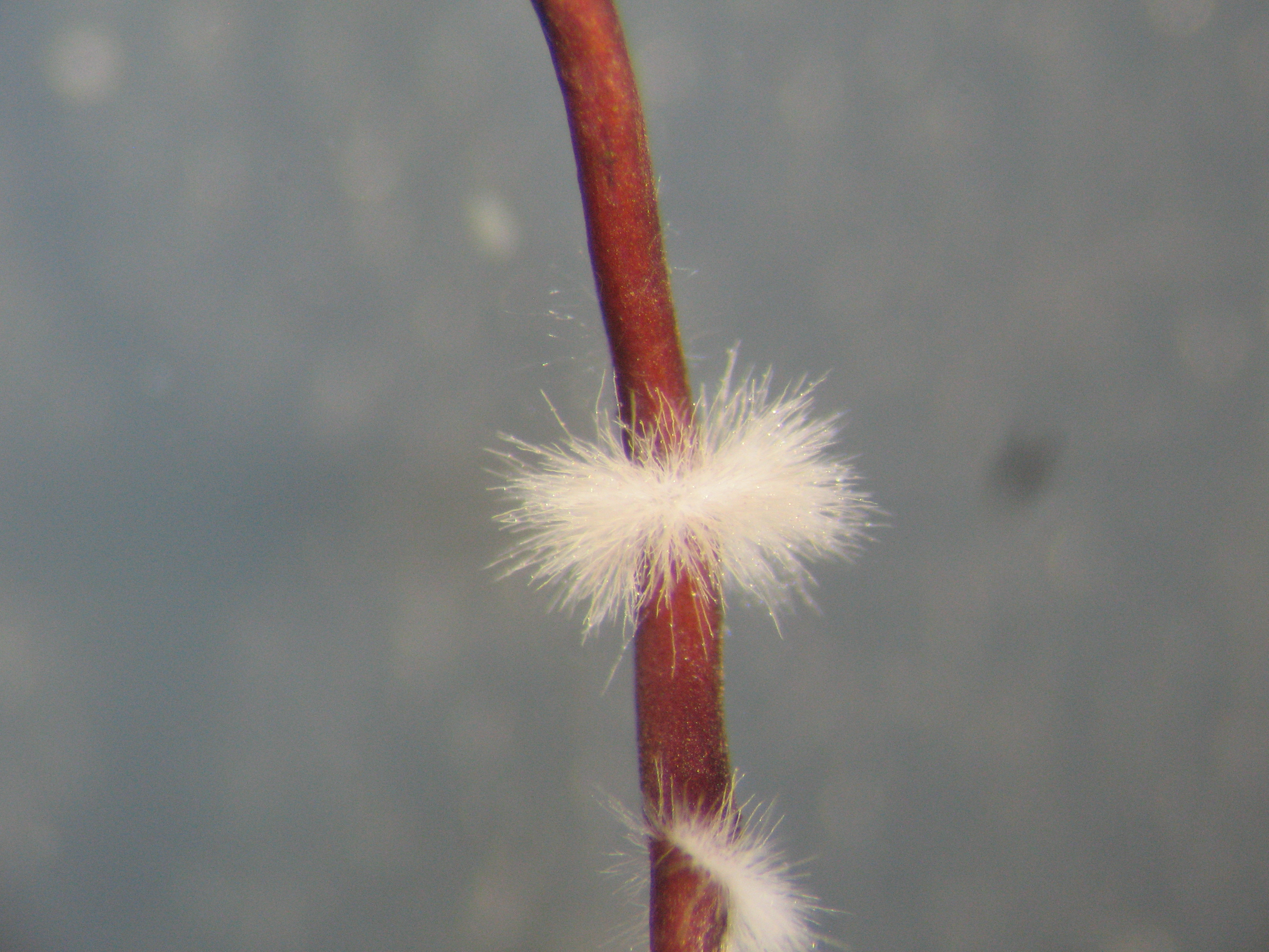 Armillaria spp. rizomorfa, kuras plīsuma vietā redzami micēlija pavedieni.